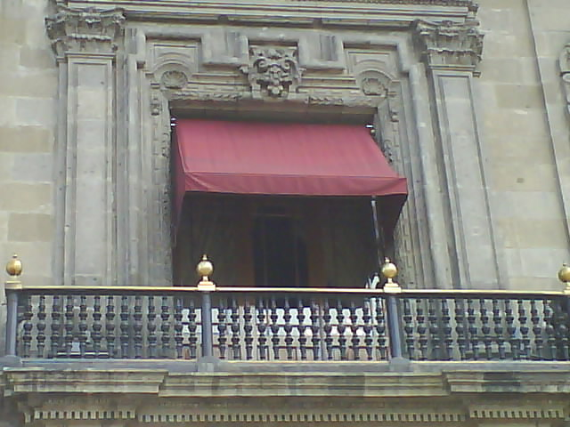 Balcón desde el cual el presidente de la republica encabeza las ceremonias del 15 y 16 de septiembre (grito y desfile)